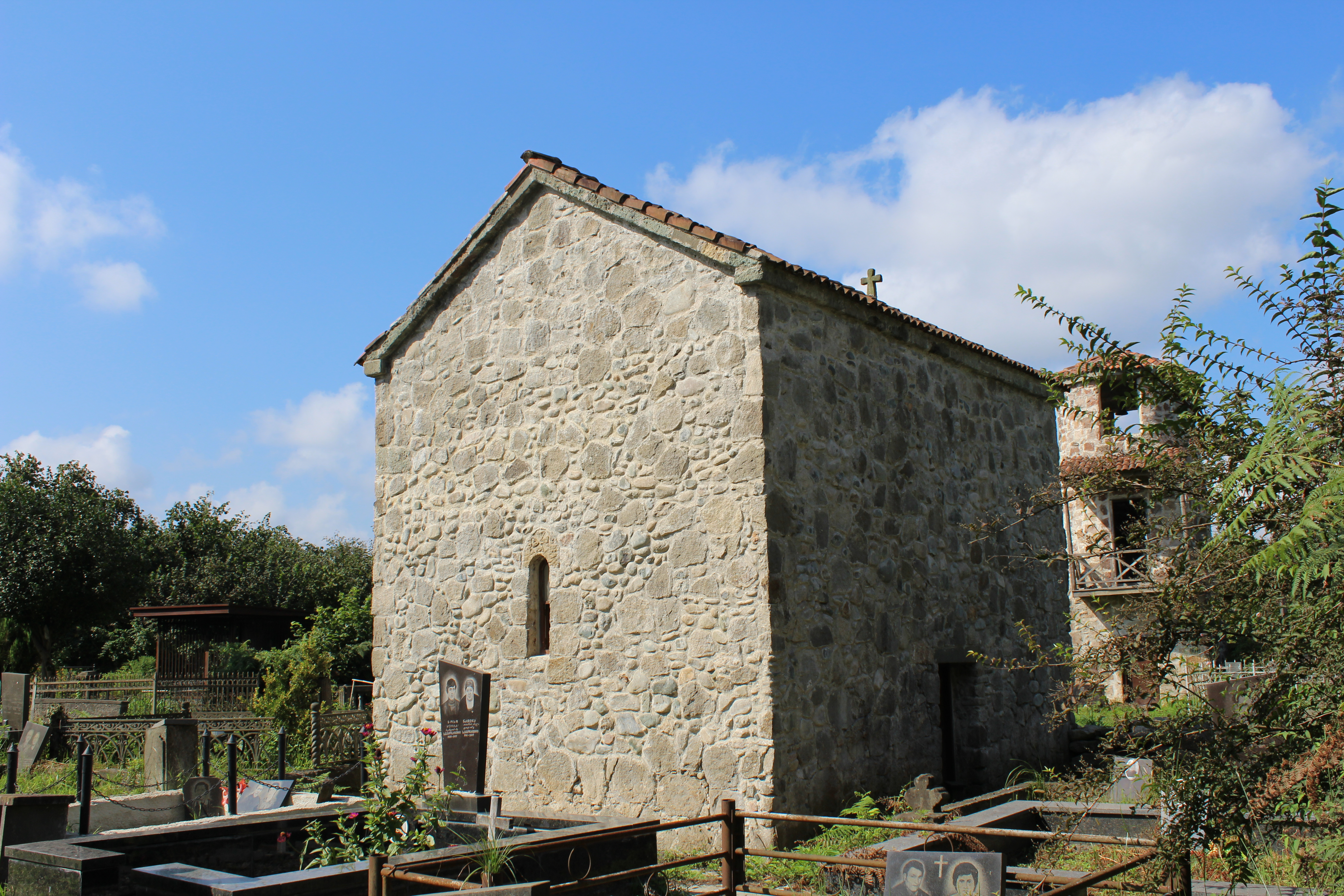 დვაბზუს XIX საუკუნის ეკლესია